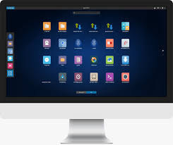 Menu de Aplicaciones de Antergos con Gnome